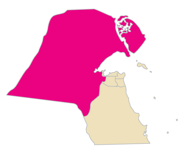 Al Jahra